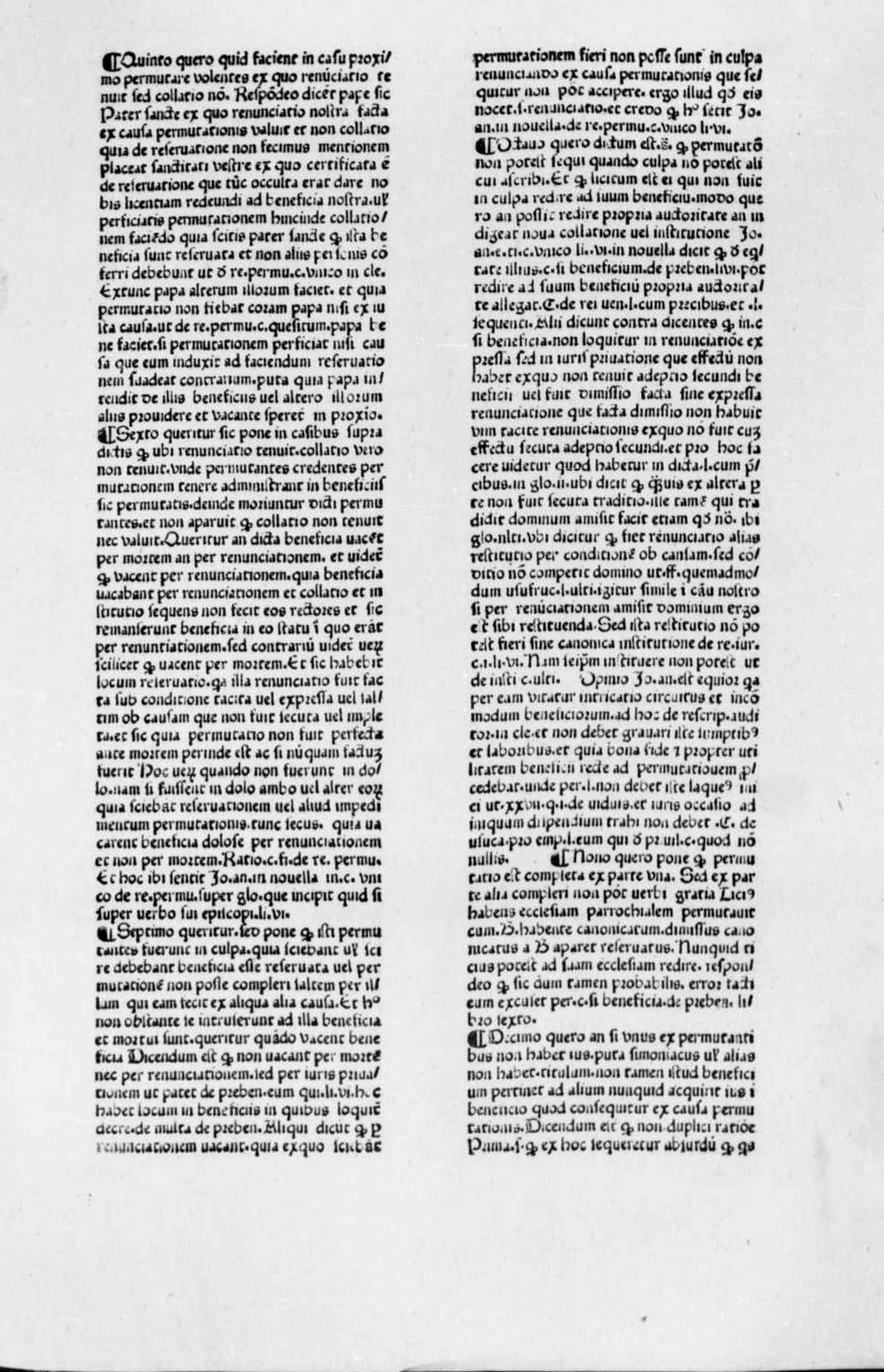 carta a2r